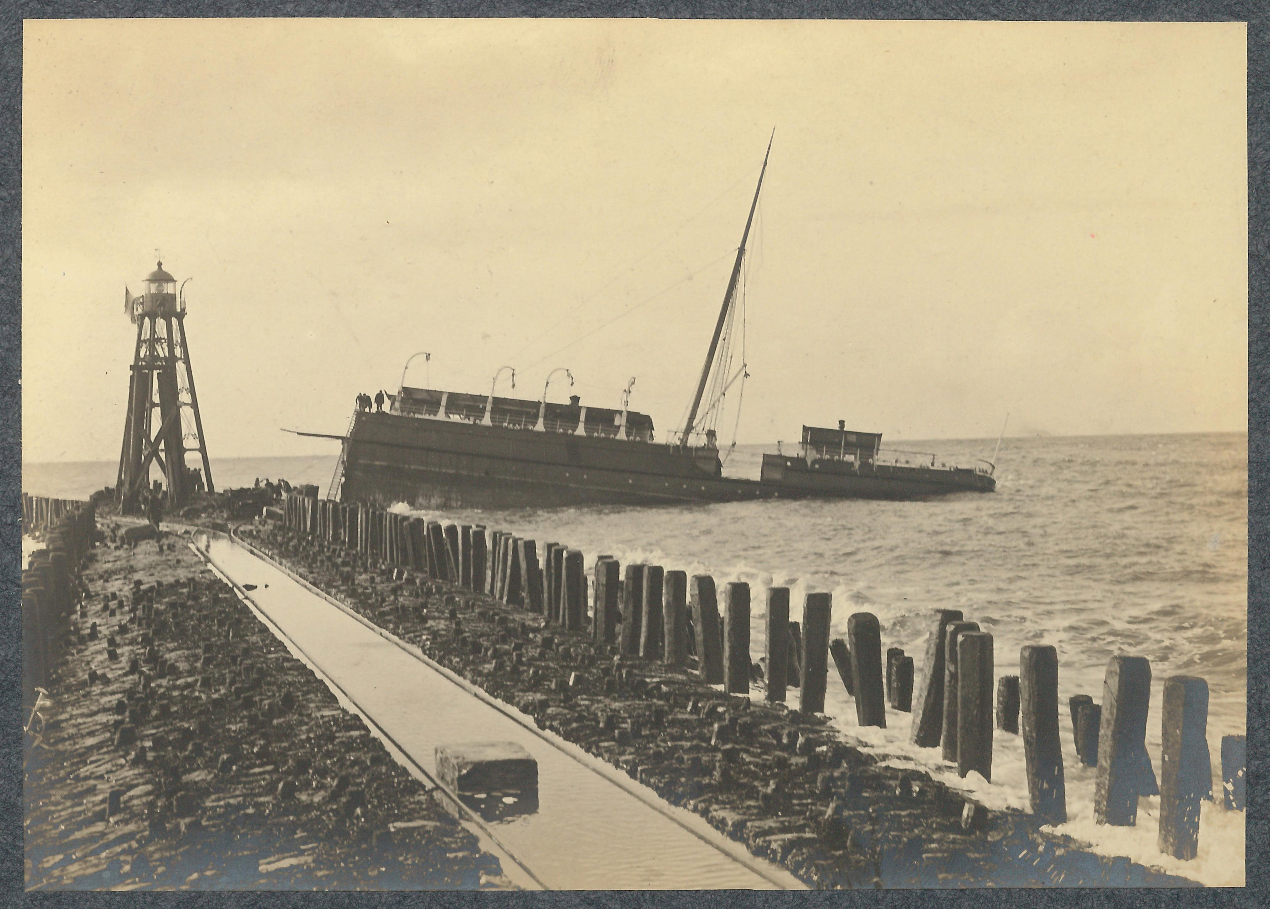 Op 21 februari 1907 ramde een Engelse veerboot, het stoomschip Berlin in een zware storm het Noorderhoofd bij Hoek van Holland. Het schip brak en slechts vijftien van de 143 opvarenden konden worden gered.